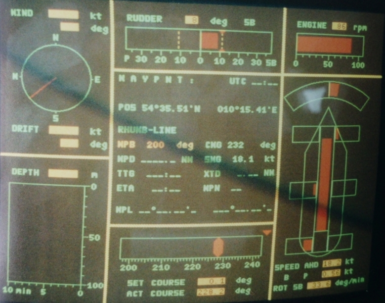 Norasia Samantha, Brückenfahrstand mit Bildschirm